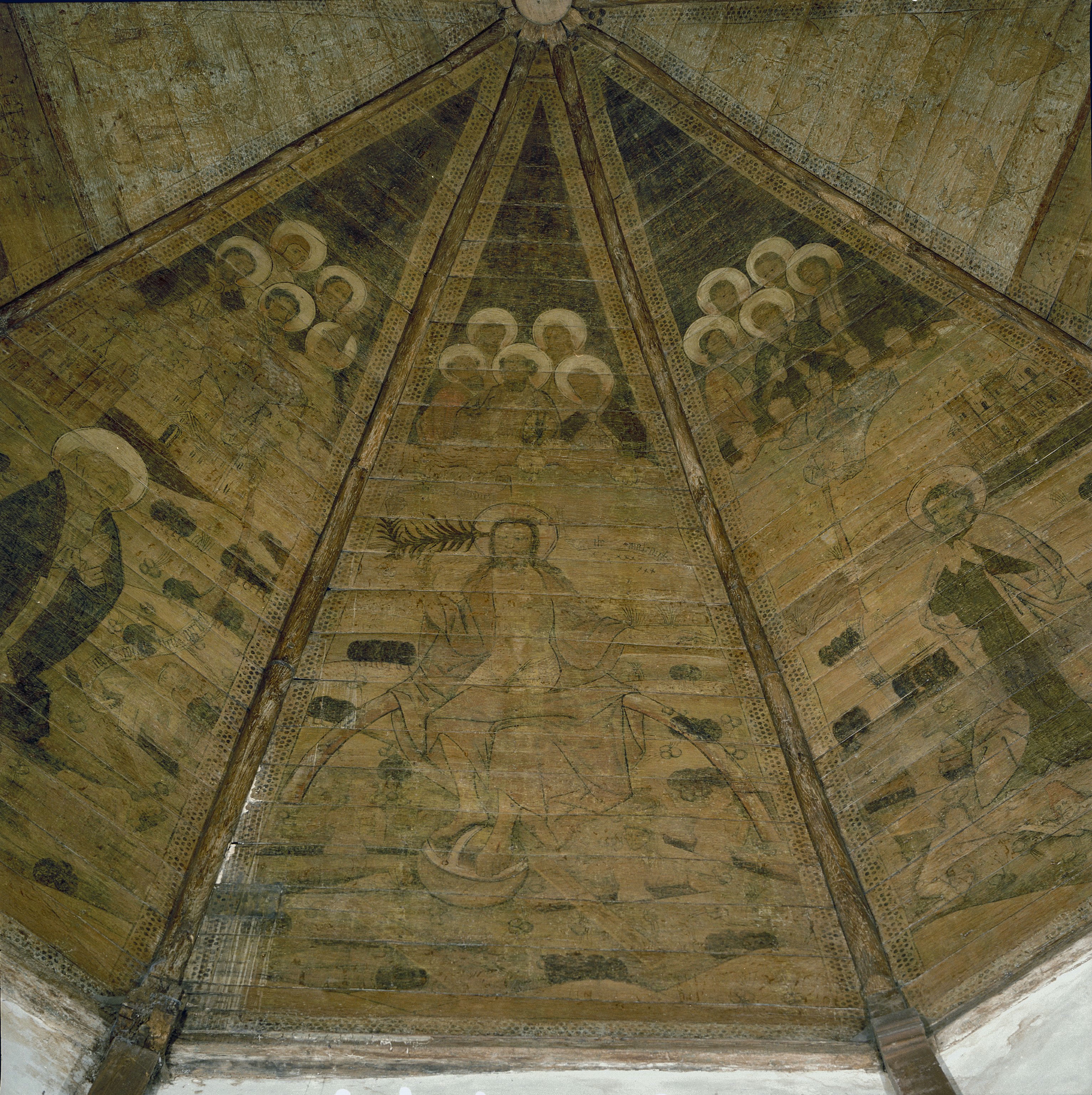 NEDERLANDS HERVORMDE KERK (ZUIDERKERK): INTERIEUR, GEWELFSCHILDERING (XV), PANEEL 14 C